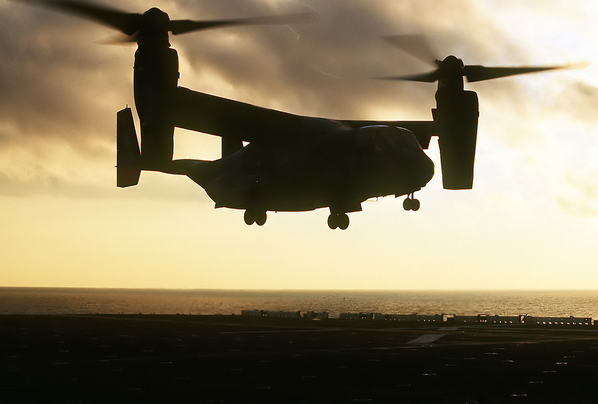 MV-22 Osprey - Version der U.S. Navy